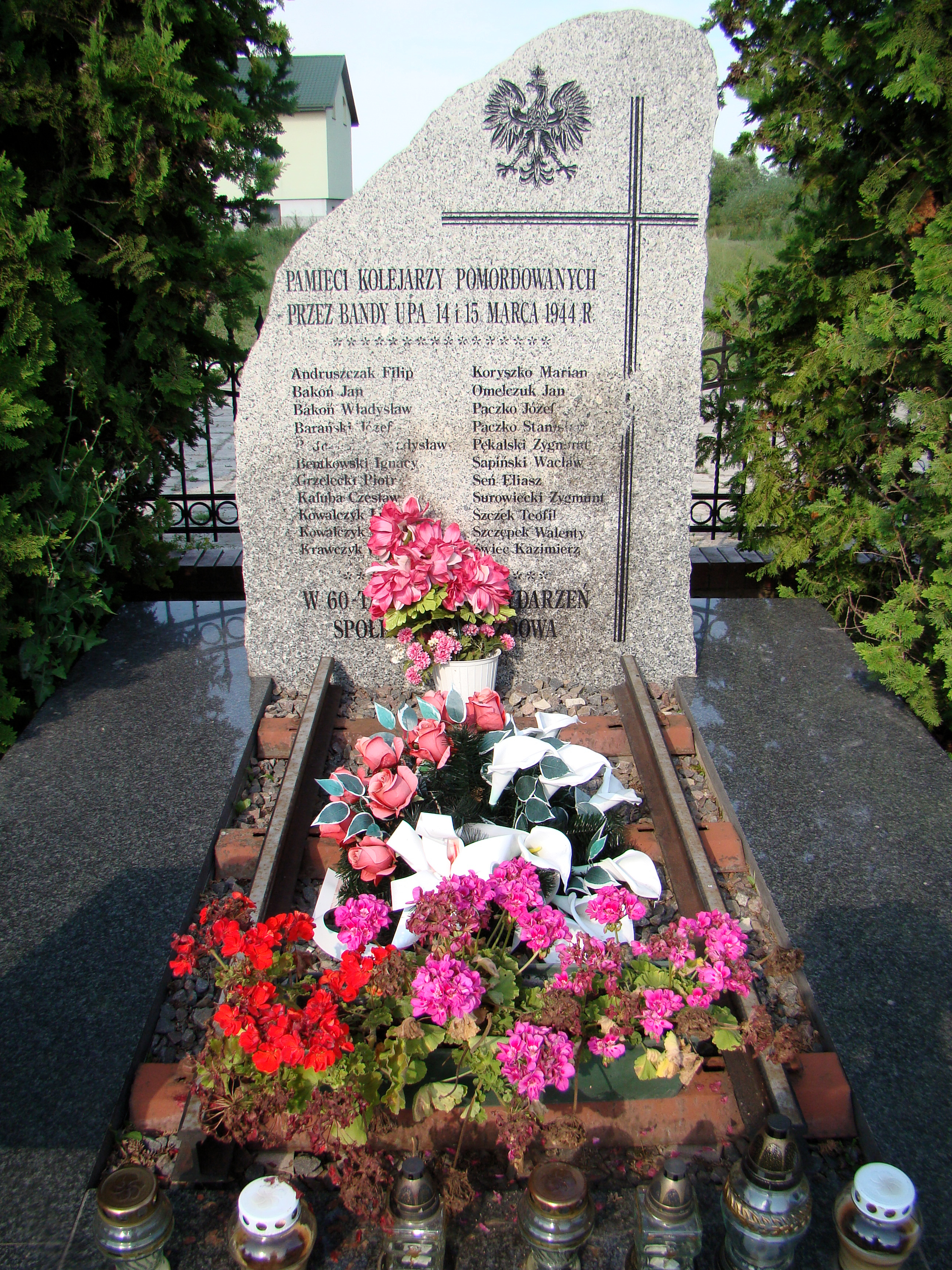 Hrob u kostela Boží milosti v Gozdówě, Polsko